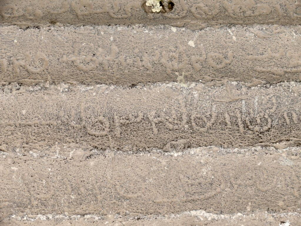 Pahlavi inscriptions, Sassanian era, Persepolis museum, Iran